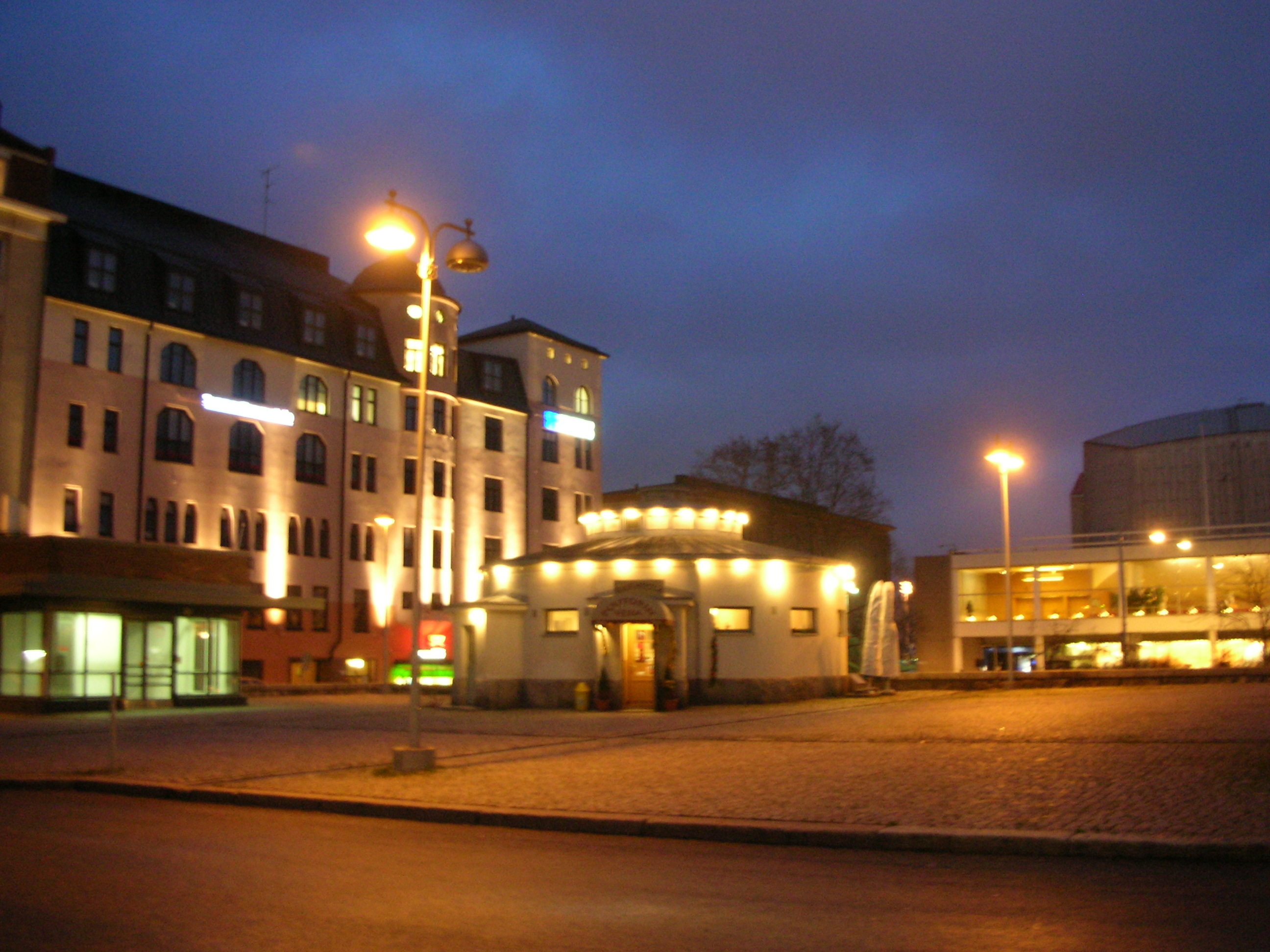 Puutori in Turku, Finland, at night.